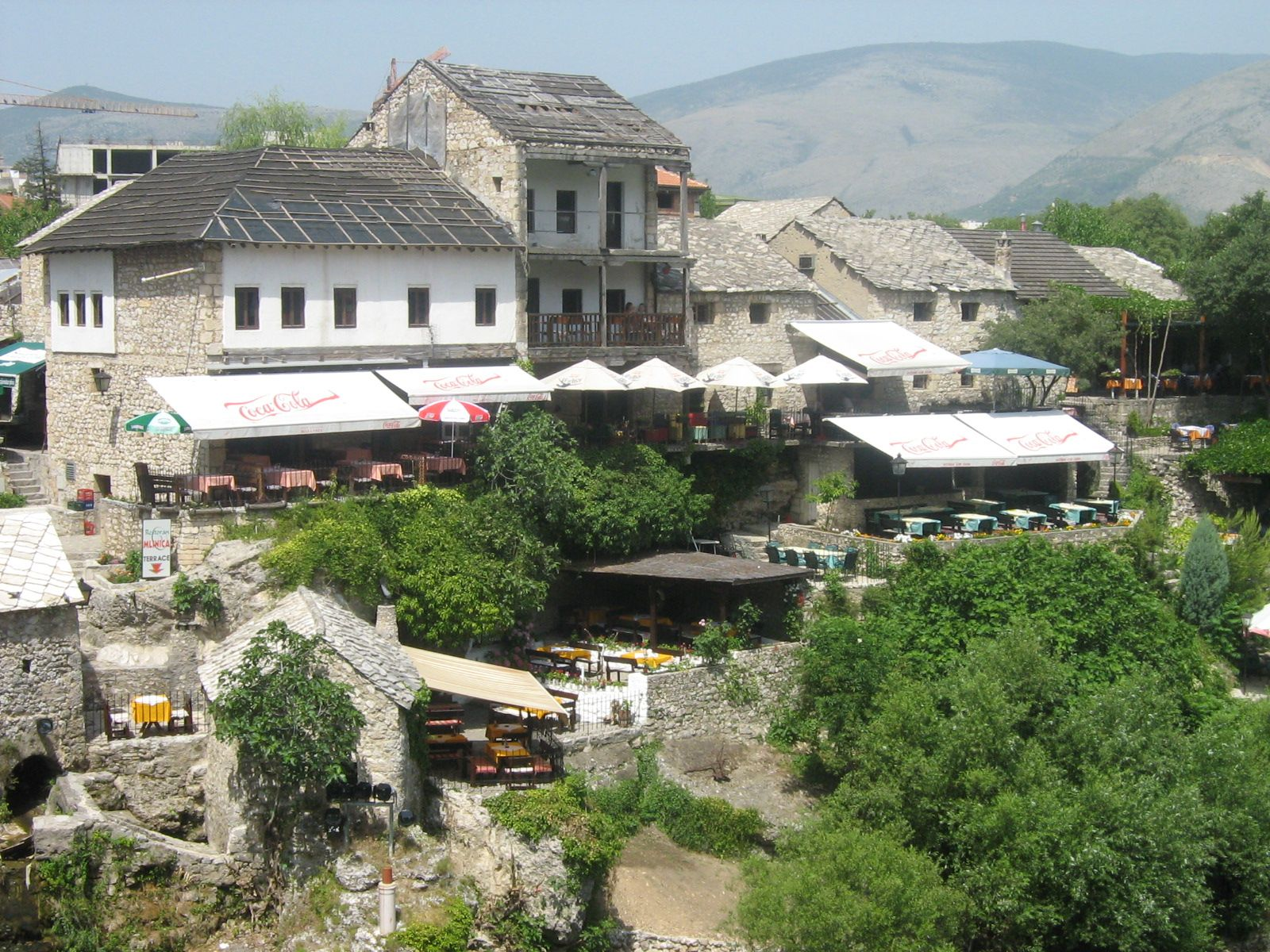 Stari Most u Mostaru 2006